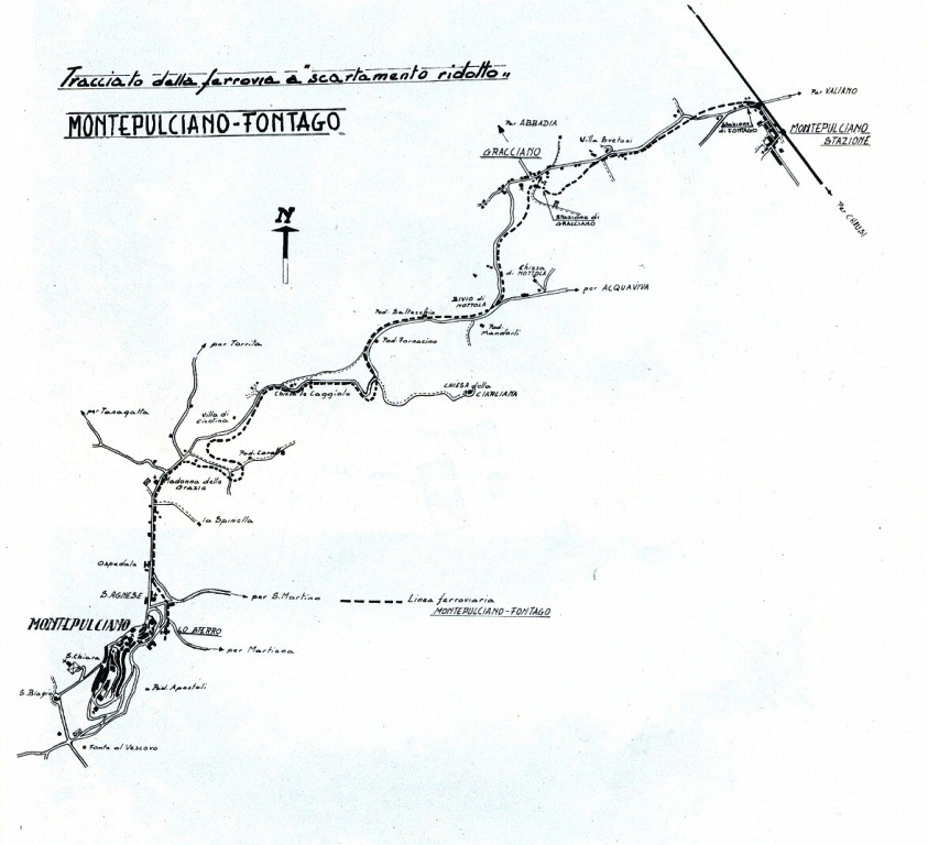 Ferrovia Montepulciano-Fontago Volume di valore storico locale, proveniente da collezione privata.